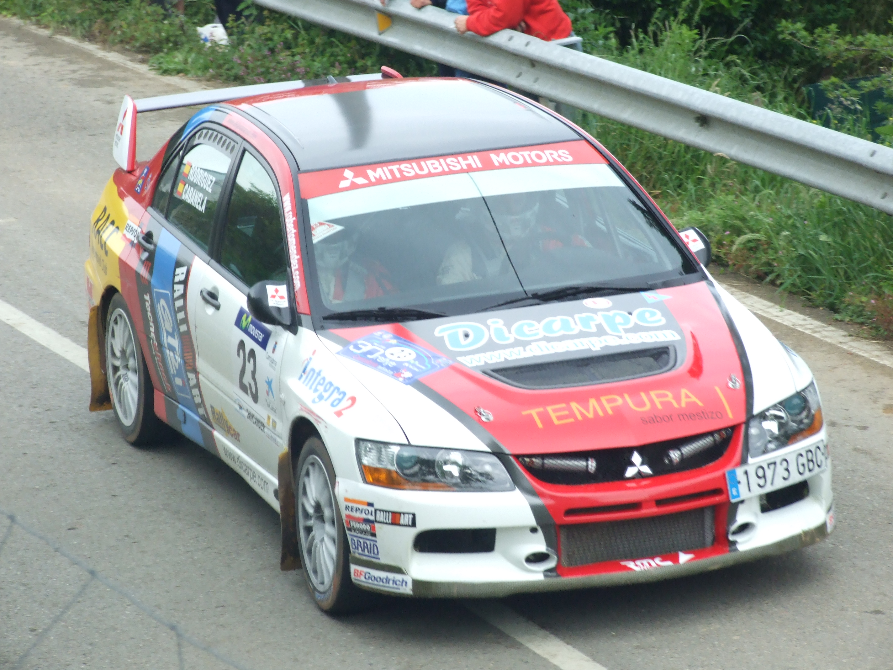 Diego Cabanela y Alberto Rodríguez González con un Mitsubishi Lancer Evo IX en el Rallye Cantabria Infinita 2008 en Lloreda de Cayón